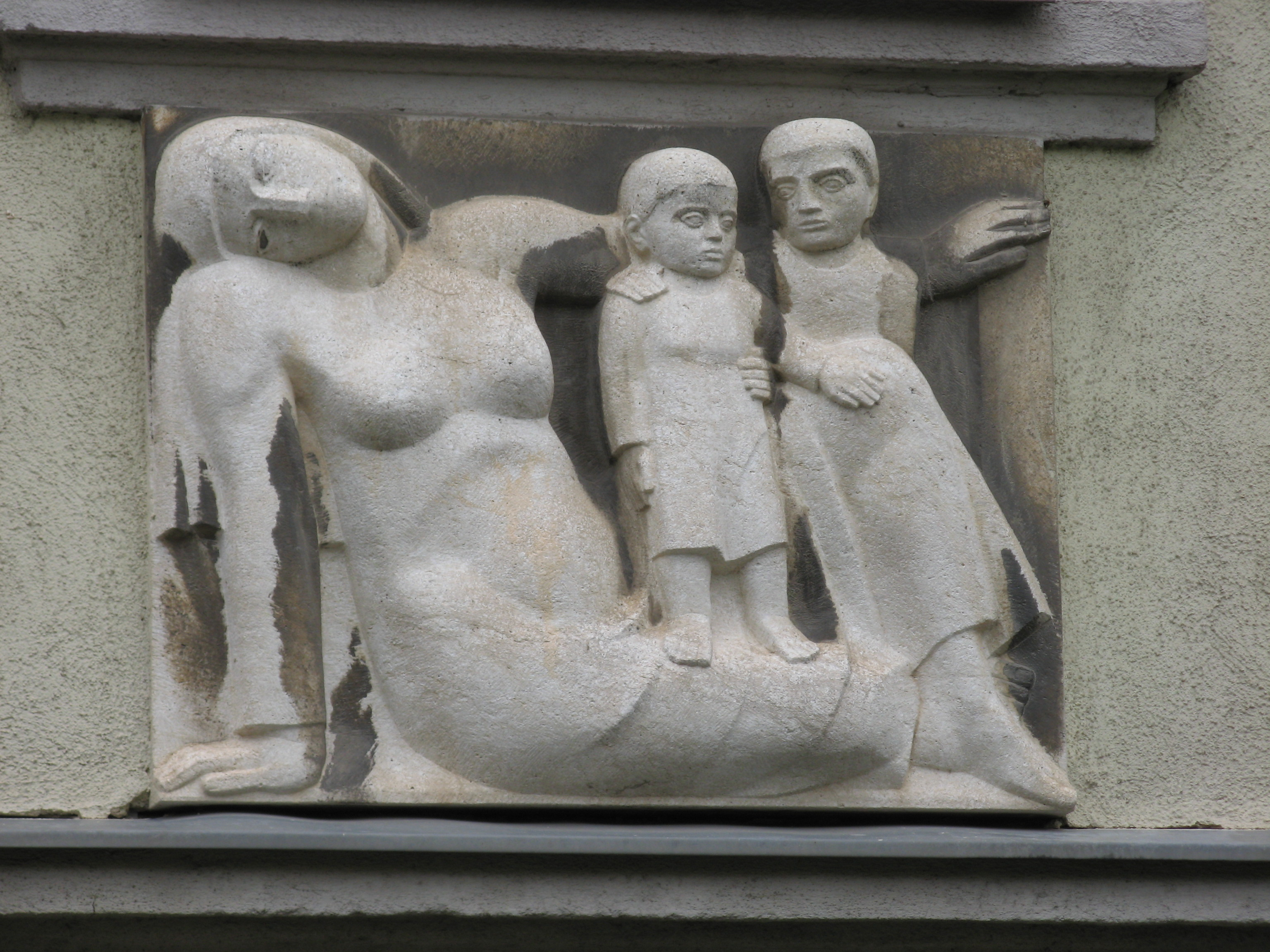 Mutter mit Kindern (1953), Steinrelief von Adolf Treberer-Treberspurg am Haus Hohenbergstraße 14, Wien-Meidling This media shows the Vienna residential building (Gemeindebau) with the ID 897.